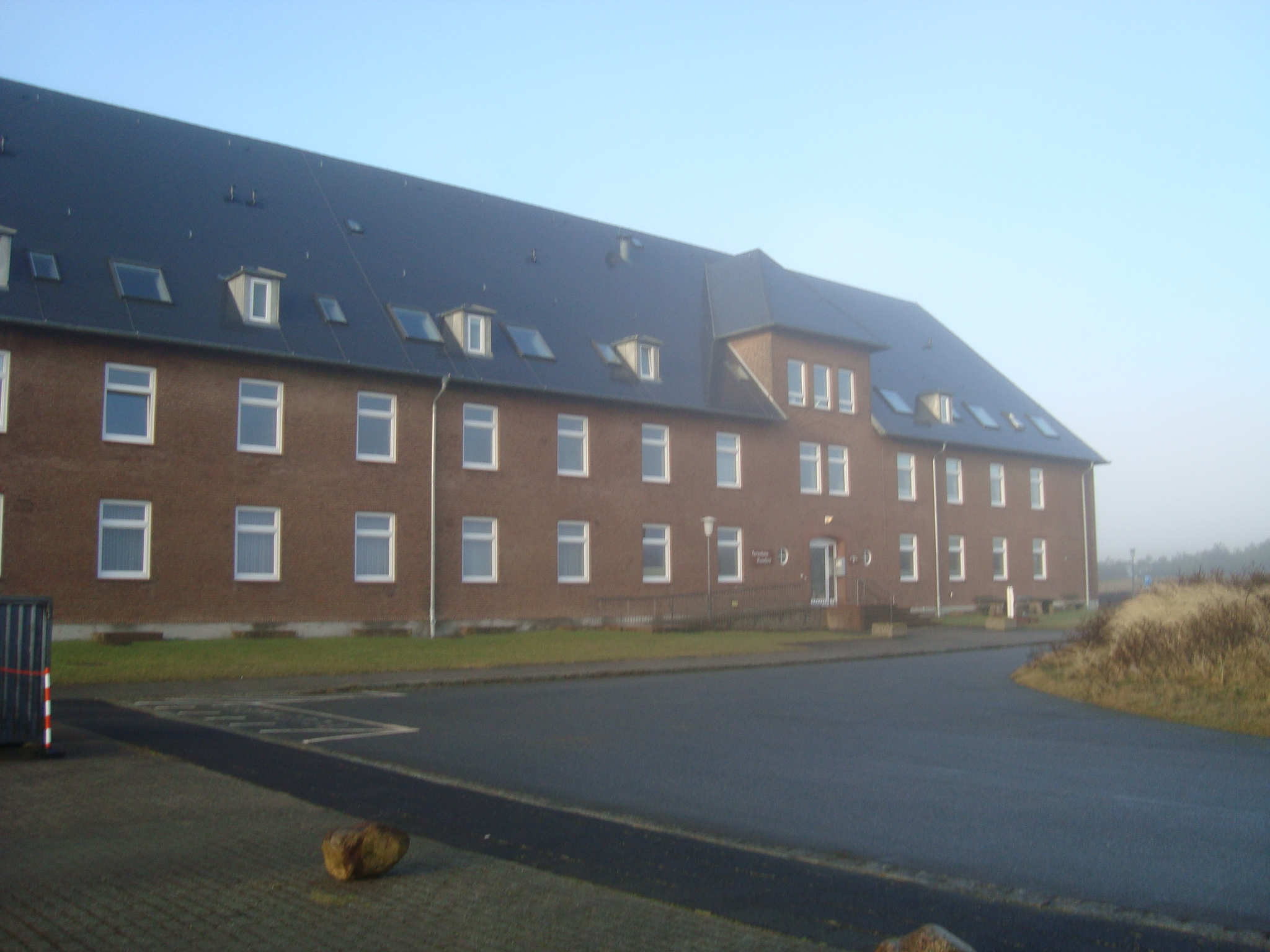 Ferienhaus des Sozialwerks der Bundesfinanzverwaltung in Rantum/Sylt